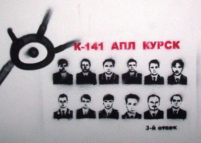 Stencil graffiti in Venice in 2005